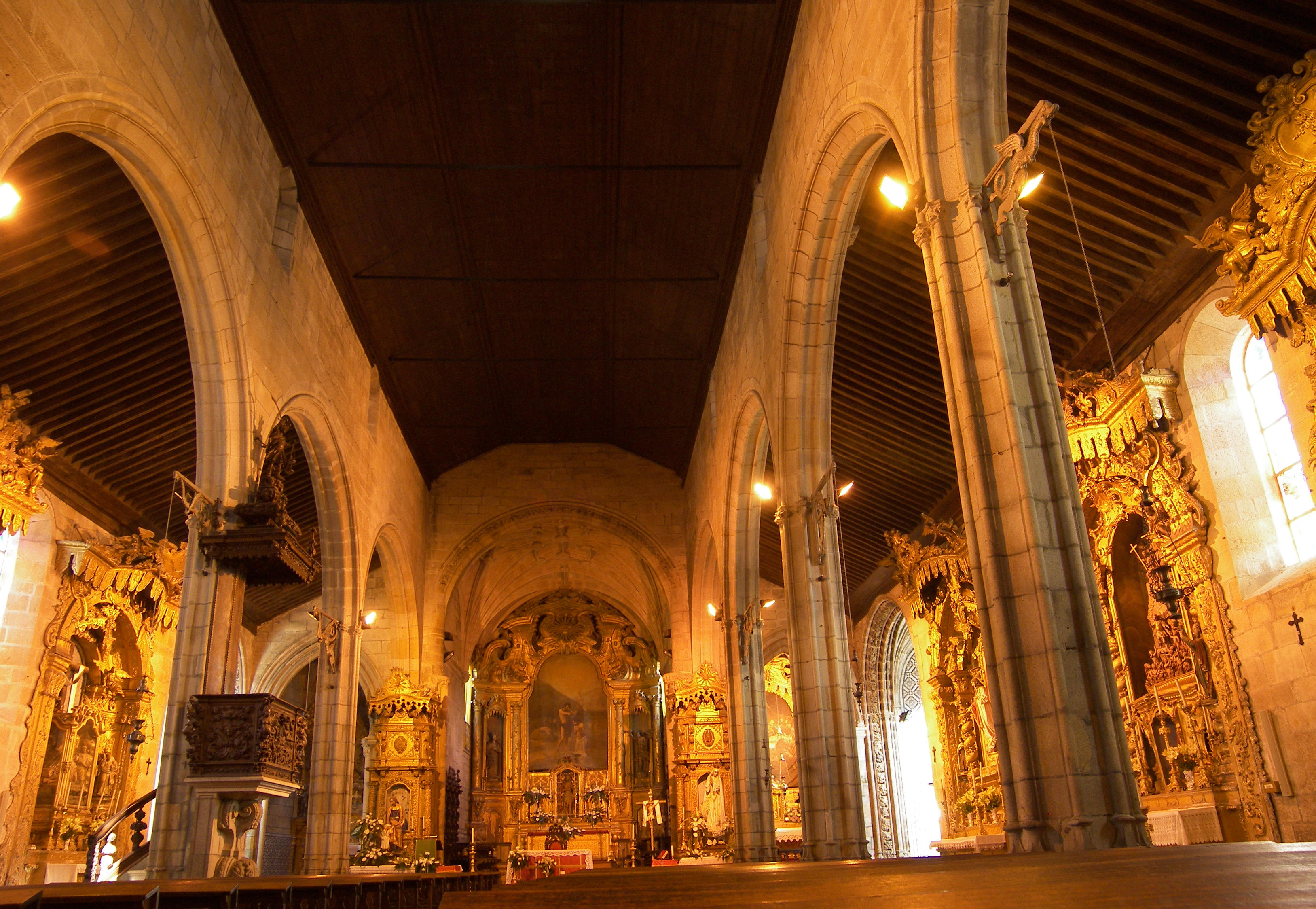 Vila do Conde, Inneres der Igreja Matriz